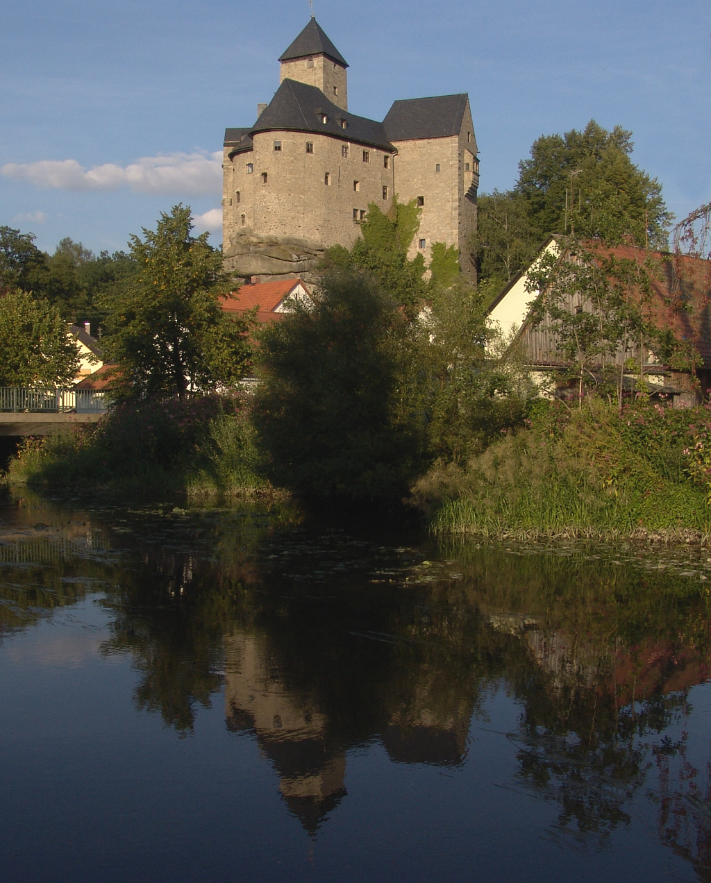 Burg in Falkenberg (Oberpfalz)